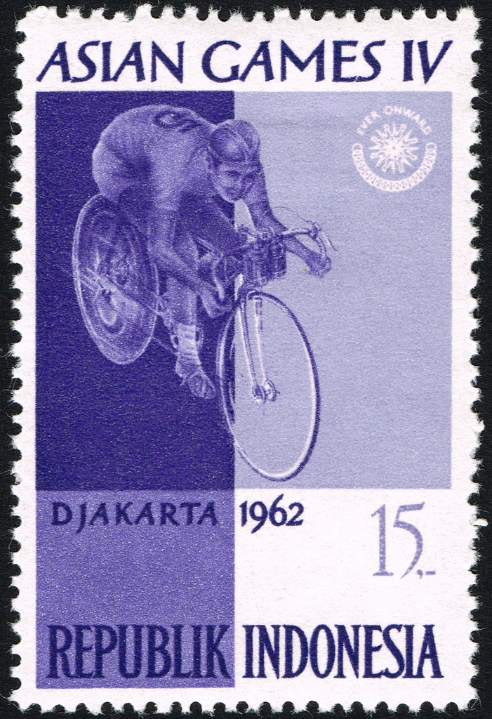 Asian Games IV